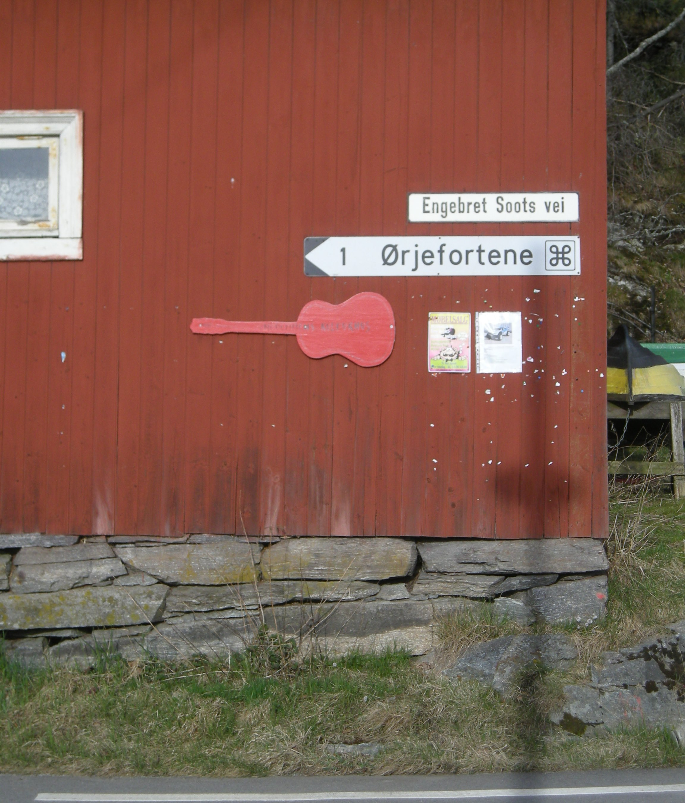 Fylkesvei 843 langs Ørje sluser heter Engebret Soots vei